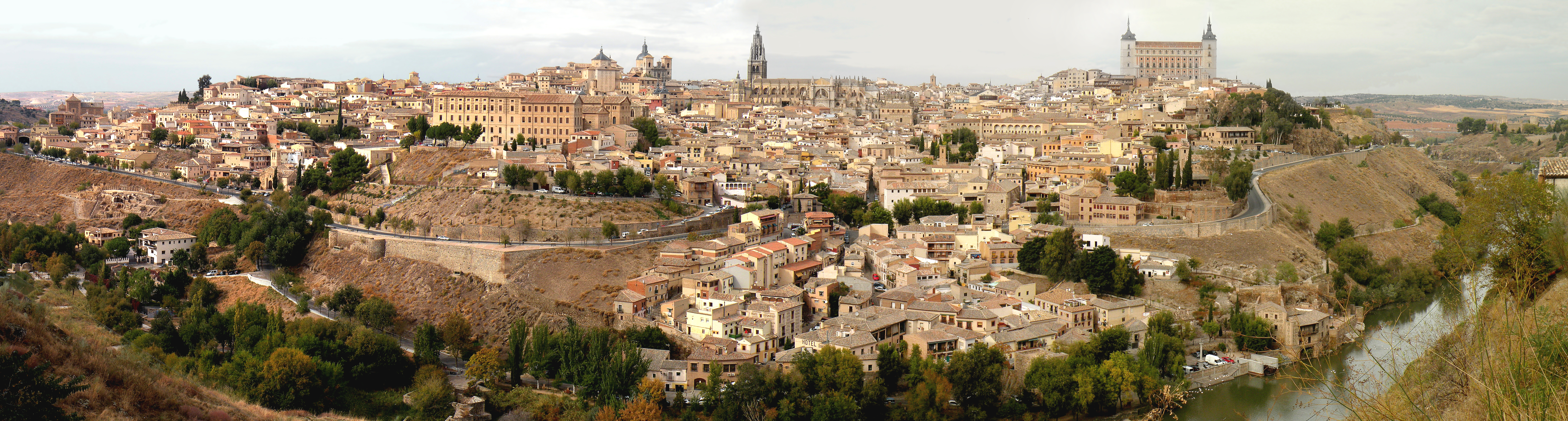 Toledo Panorama